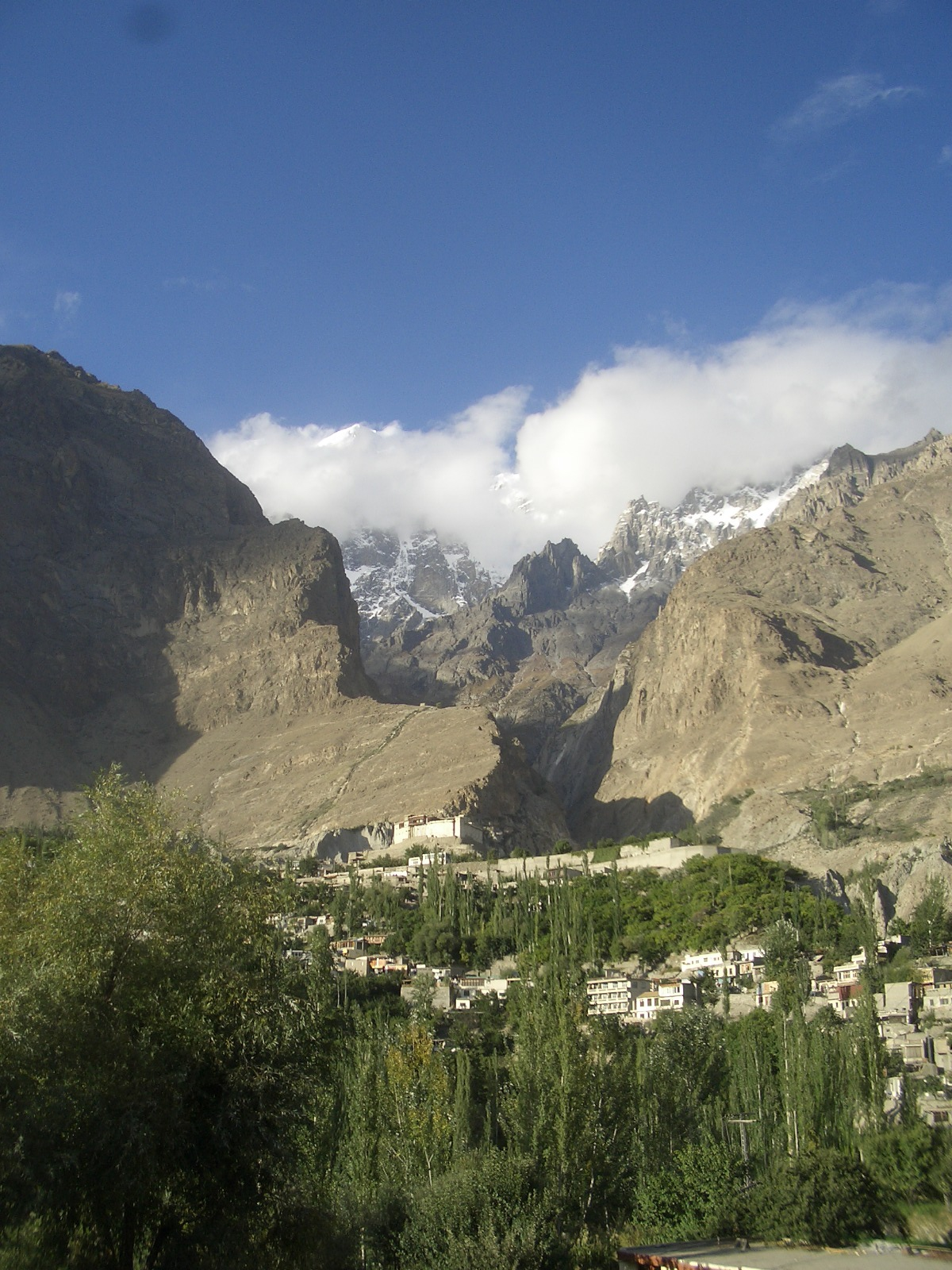 Parkistan Hunza Overview